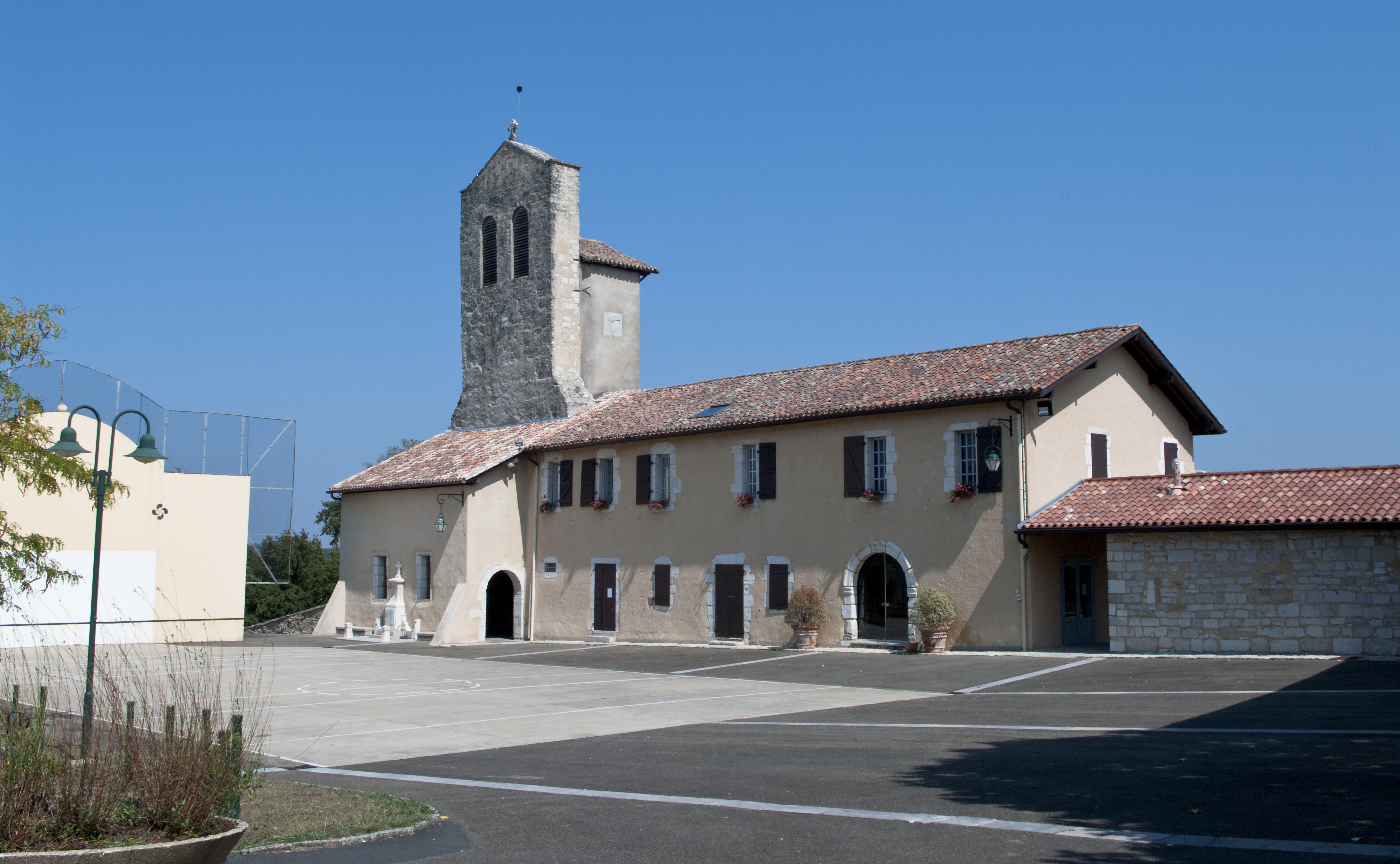 L'église Notre-Dame est un lieu de culte catholique situé dans la commune de Lahonce, dans le département français des Pyrénées-Atlantiques. .